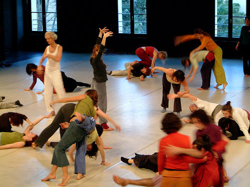 Photo prise par David Olivari lors de la jam de Contact improvisation de 12 heures qui eut lieu en décembre 2004 à Montpellier